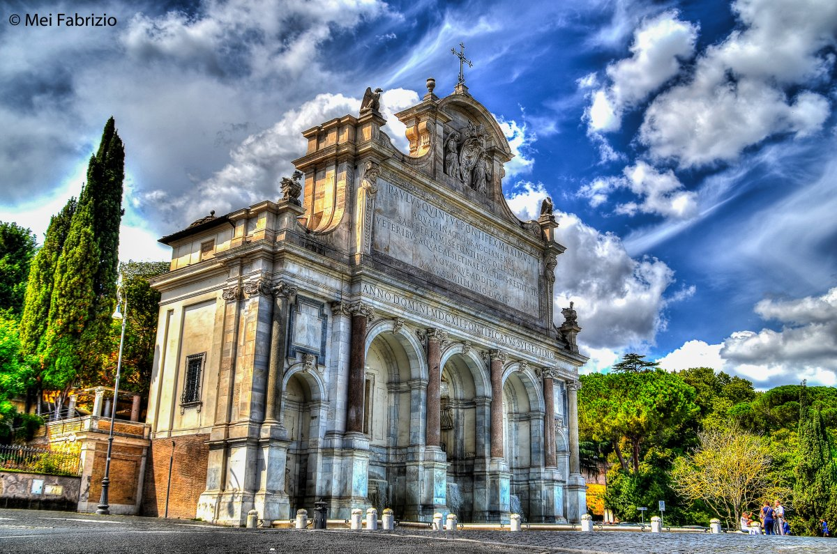 Fontana dell'Acqua Paola HDR